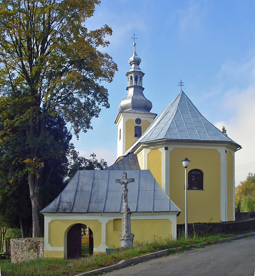 Krajanów - kościół p.w. św. Jerzego z XVII w. (zabytek nr A/1799/1557 z 1966)